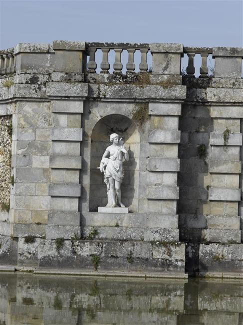 ArtistLouis-Félix Chabaud (1824-1902)TitleDianeDescription Bassin des cascades au château de Fontainebleau. Current locationChâteau de Fontainebleau.Source/PhotographerRéunion des musées nationaux This work is in the public domain in its country of origin and other countries and areas where the copyright term is the author's life plus 100 years or less. You must also include a United States public domain tag to indicate why this work is in the public domain in the United States. This file has been identified as being free of known restrictions under copyright law, including all related and neighboring rights. Bassin des cascades au château de Fontainebleau.